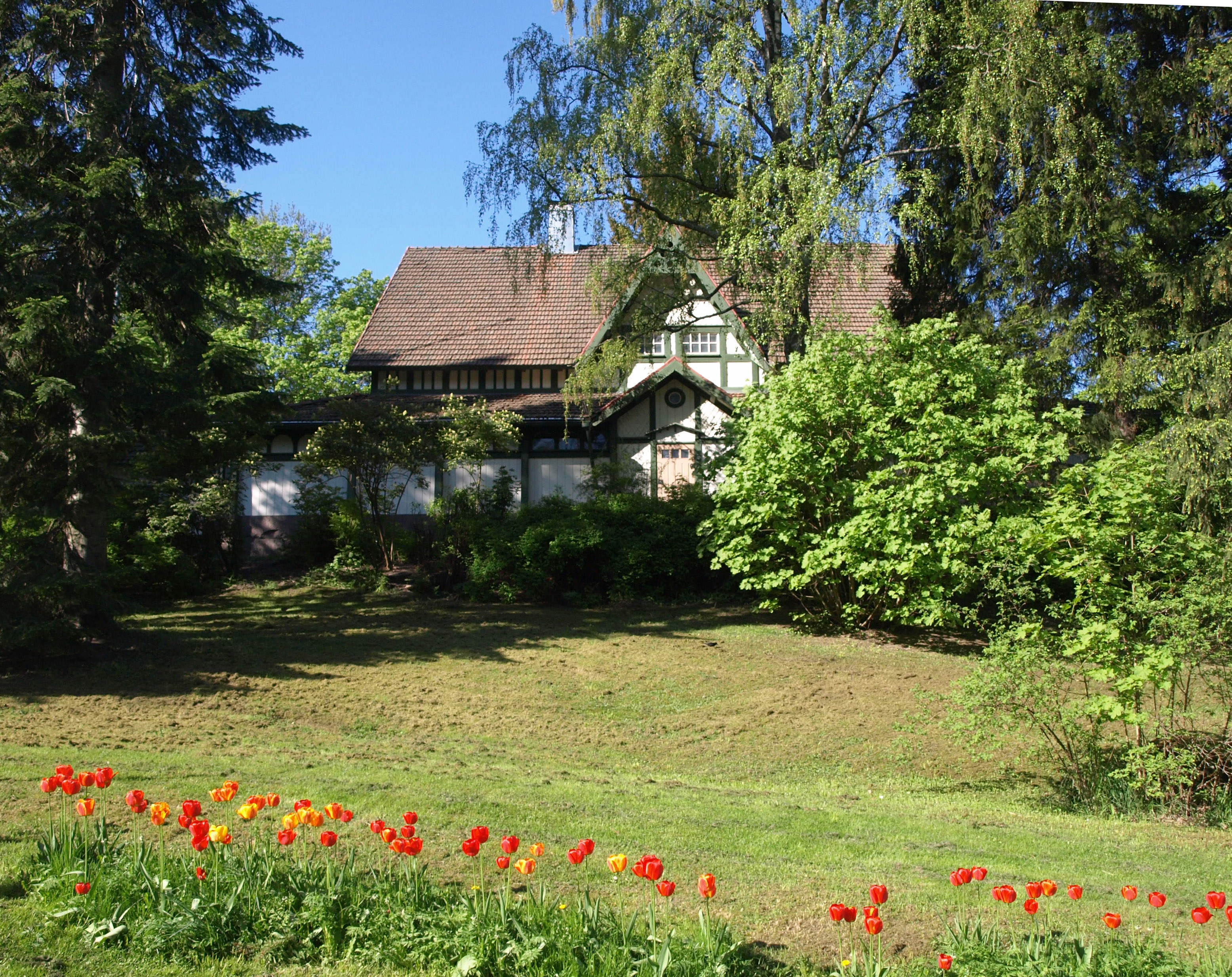 Turun biologinen museo Urheilupuiston kupeessa.